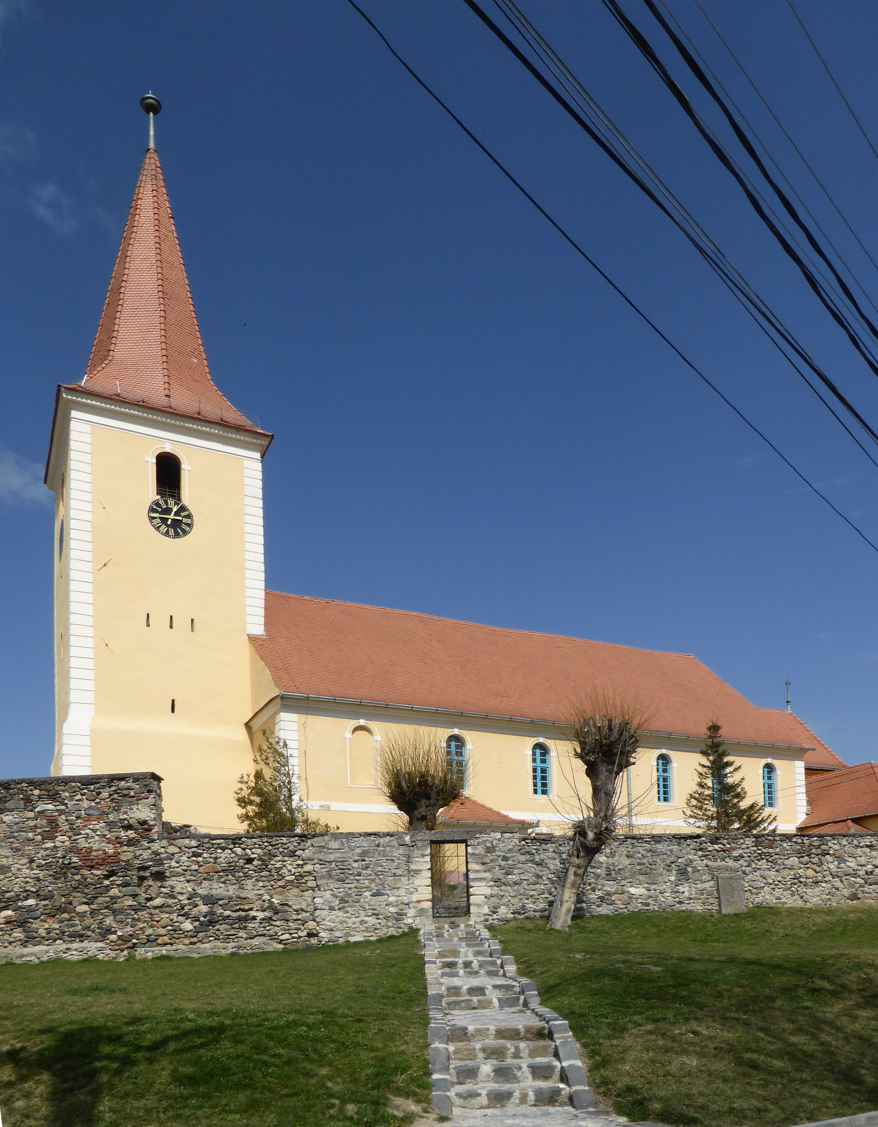 Evangelische Kirche von Talmesch (Tălmaciu).